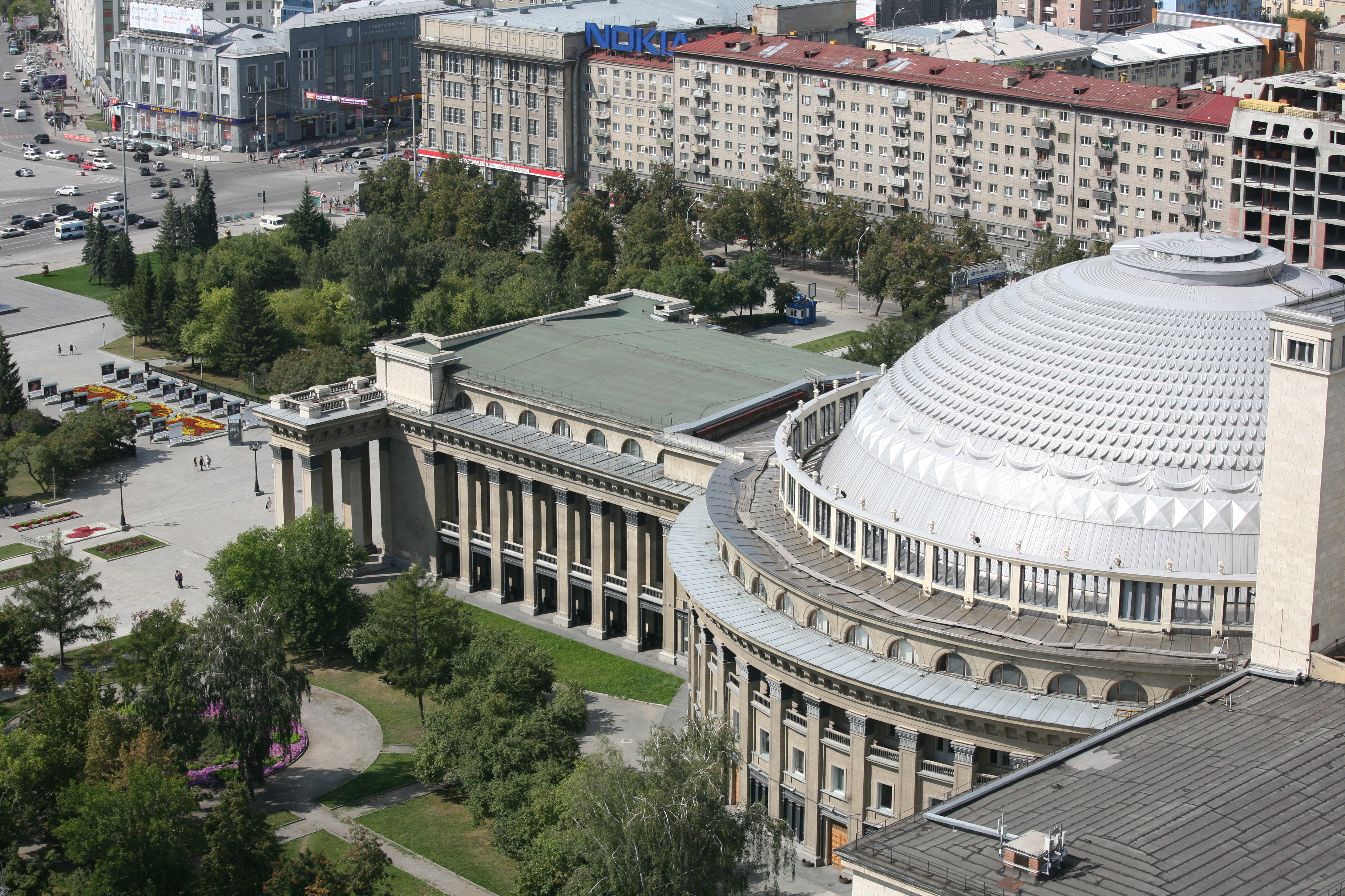 Здание Новосибирского театра оперы и балета: Красный проспект, 36, Центральный район, Новосибирск, Новосибирская область